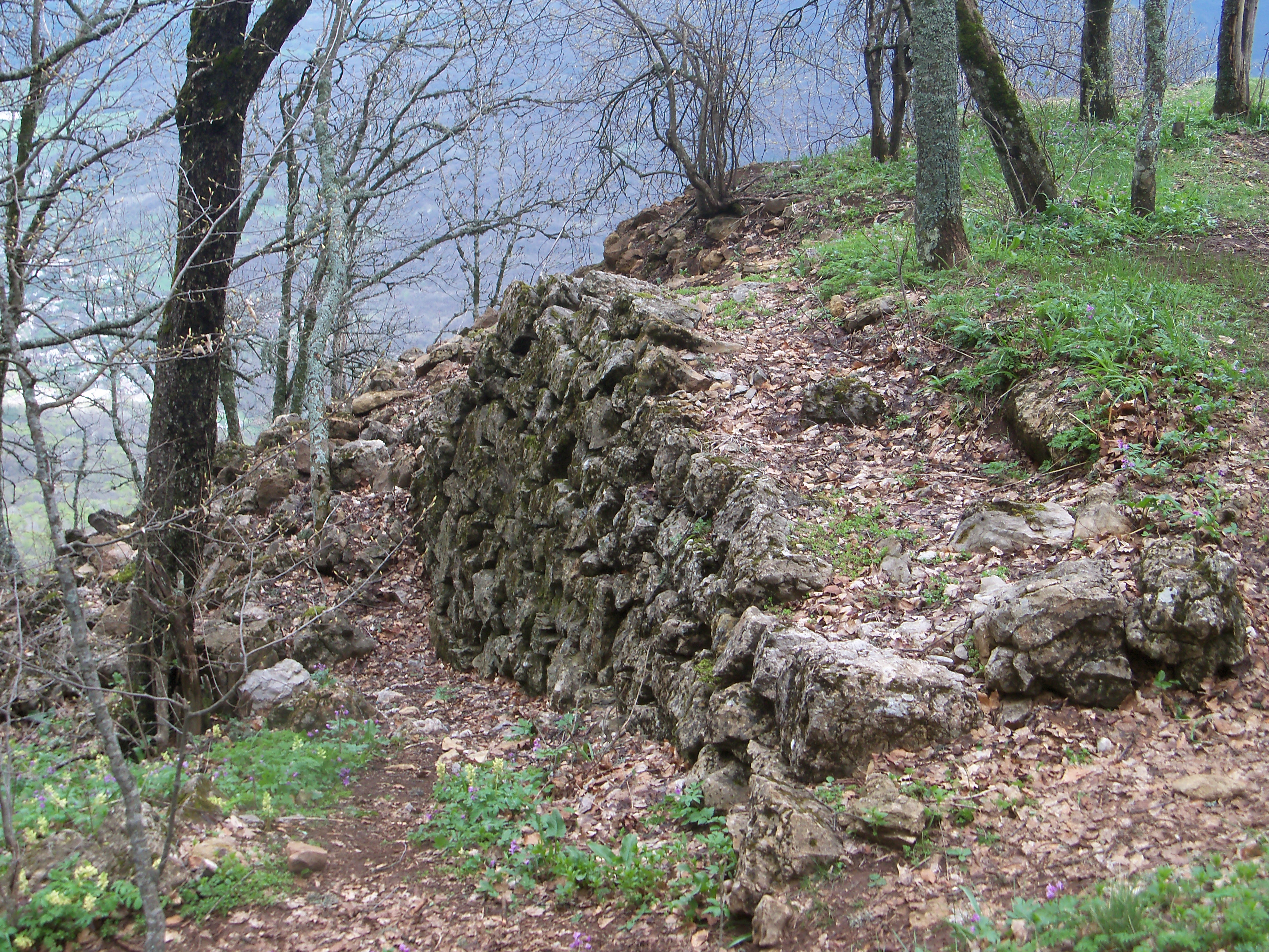 Гора Седам-Кая. Старовинна кладка — залишки споруди.